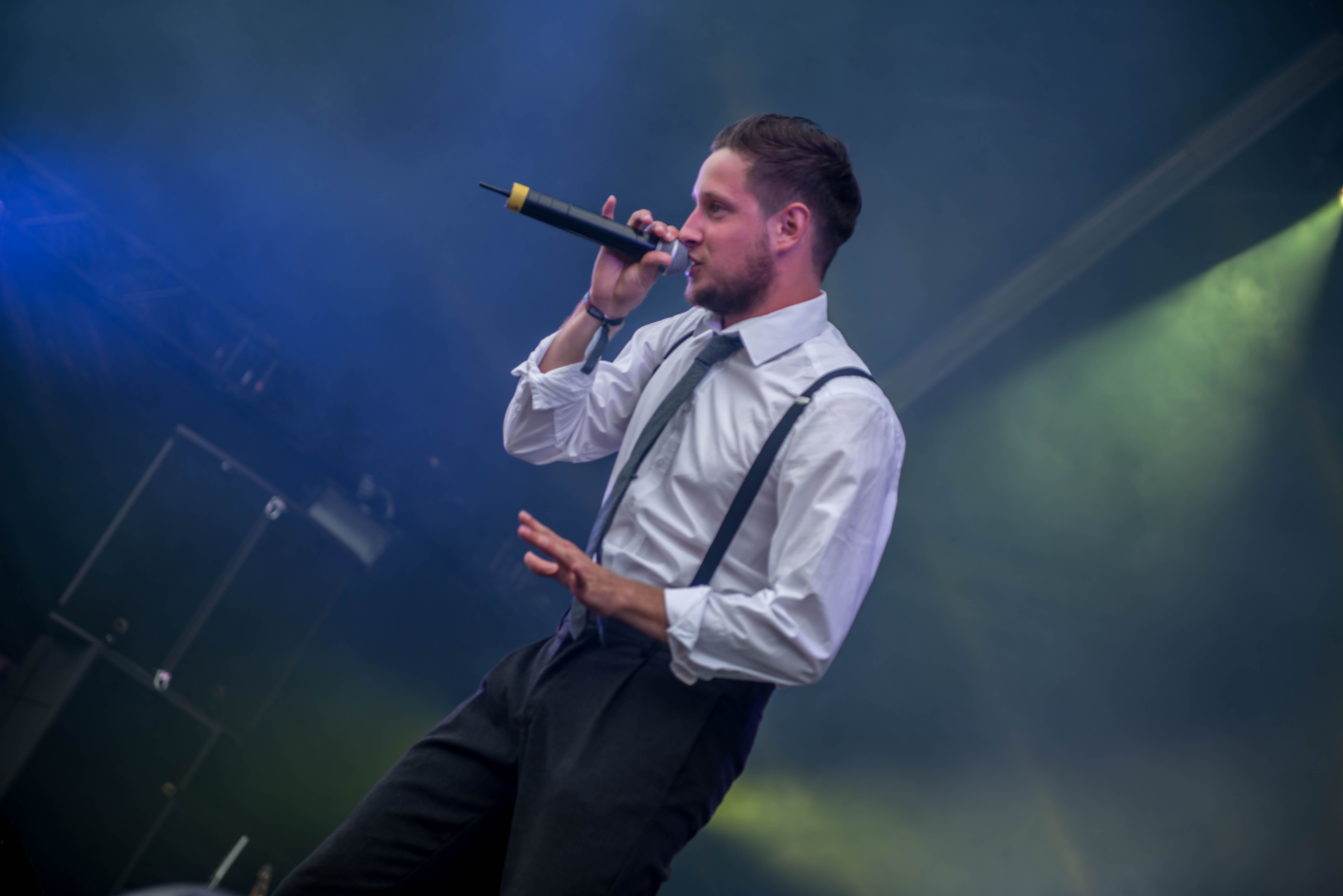 Teesy + Featuring